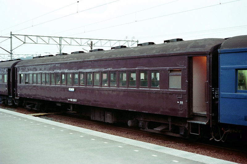 JNR Passenger car. Suhafu32-2367.（国鉄、スハフ32 2367）